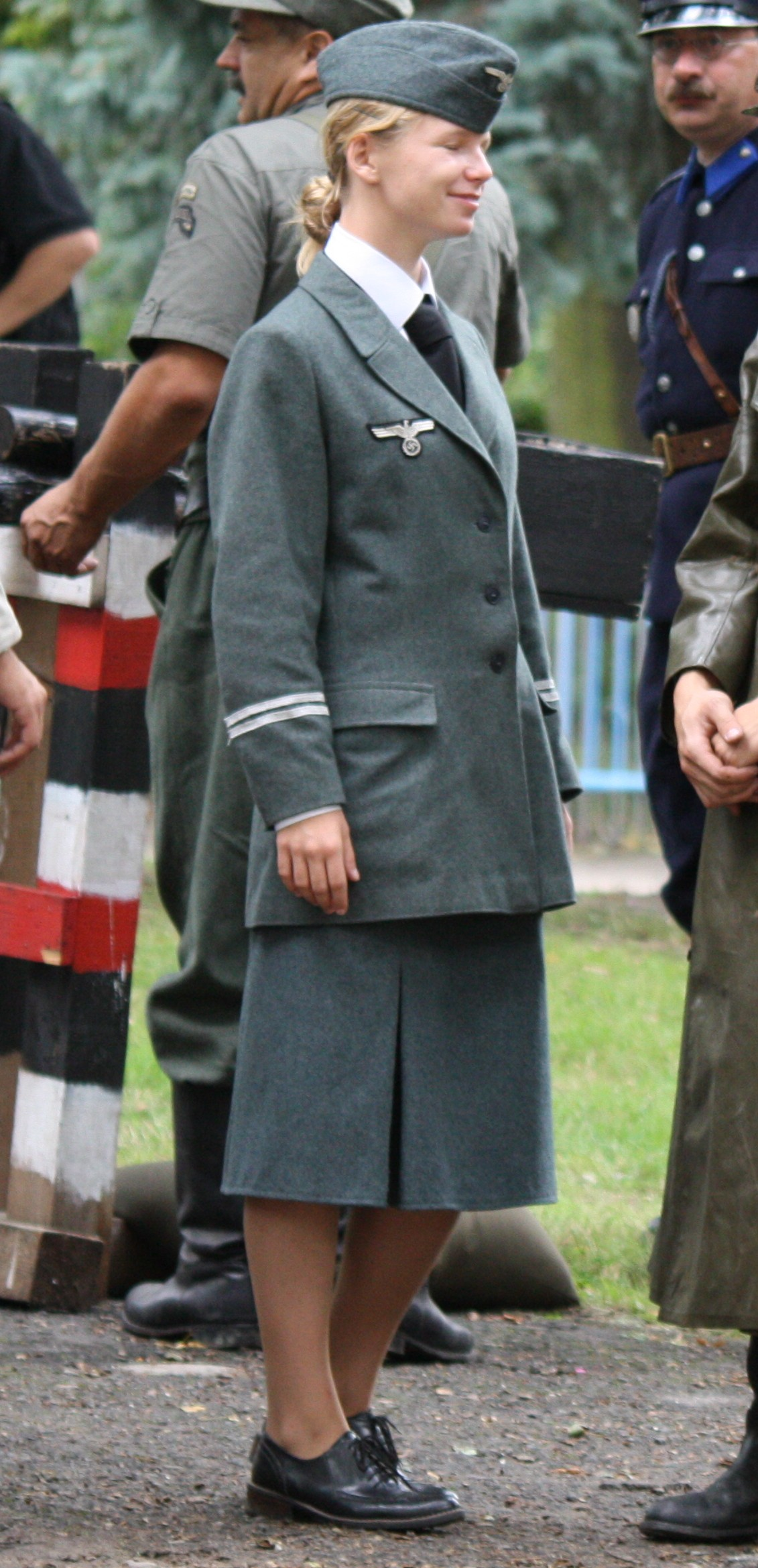 ドイツ国防軍上級女性補助員